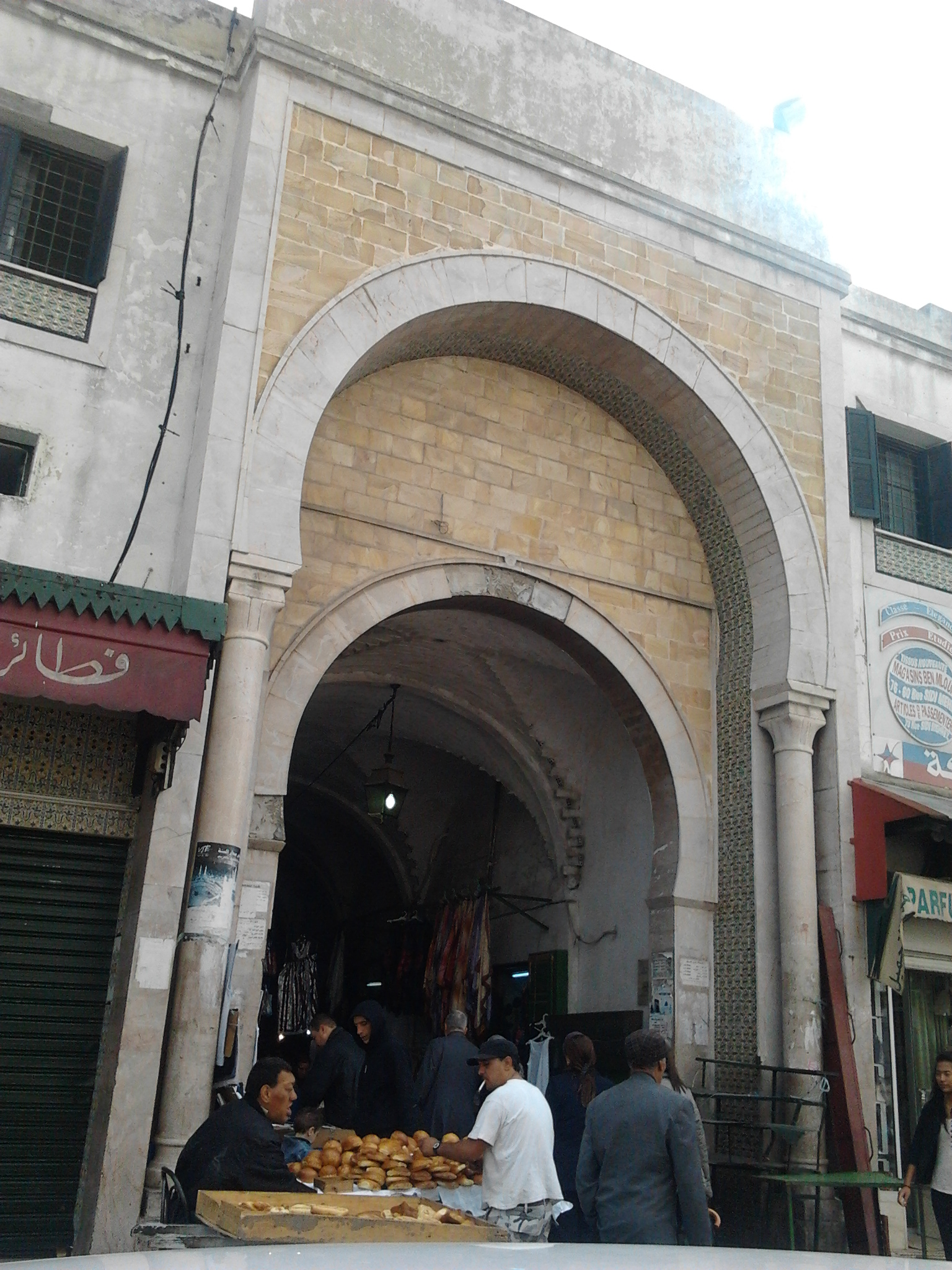 L'entrée du Souk Sidi Mehrez - Bab Souika - Tunis